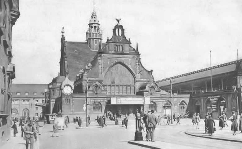 Essen Hauptbahnhof von Westen